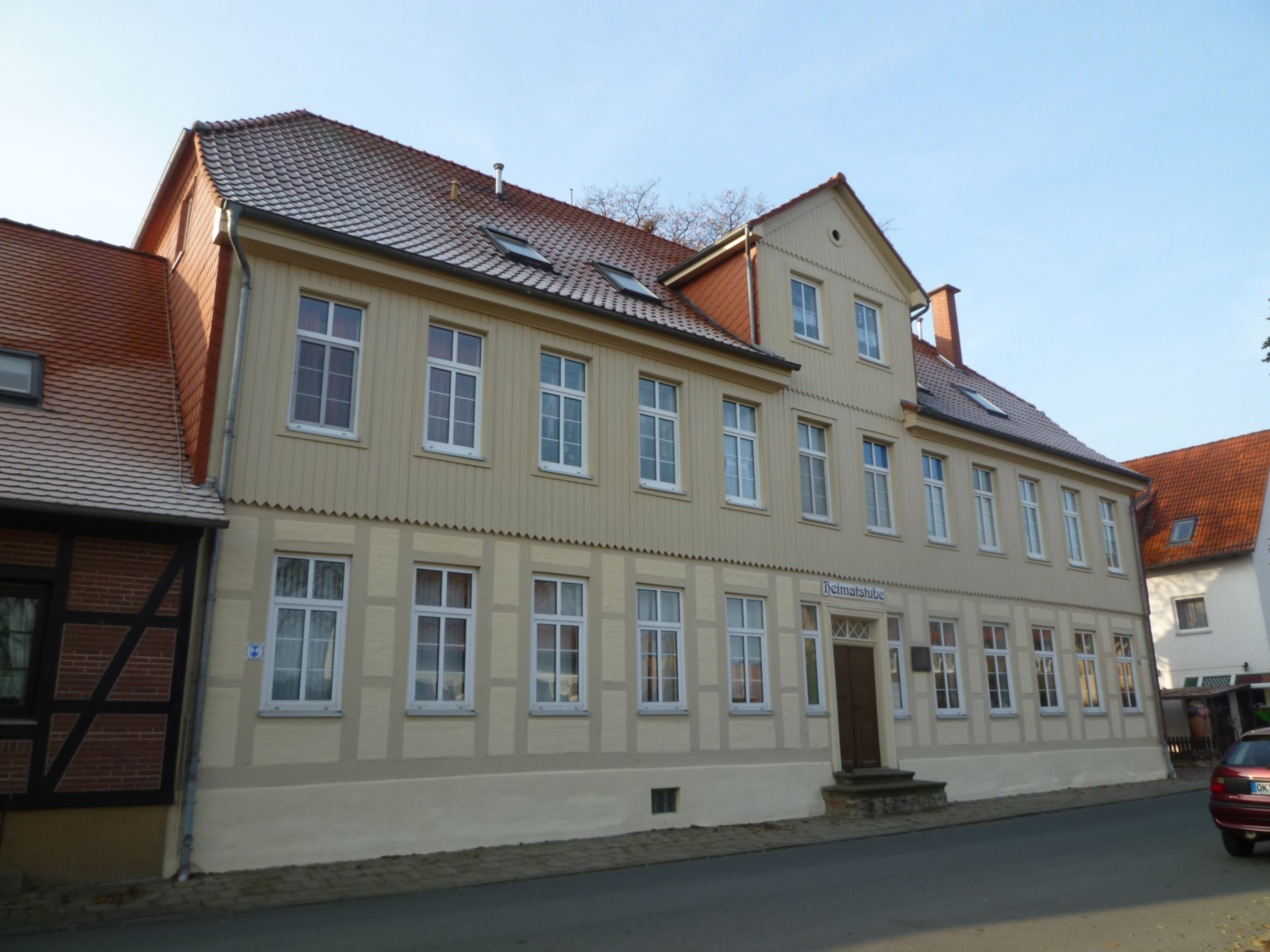 Museum Heimatstube, Geburtshaus Wilhelm von Bode, ehemaliges Amtsgericht im November 2011 nach den Sanierungsarbeiten